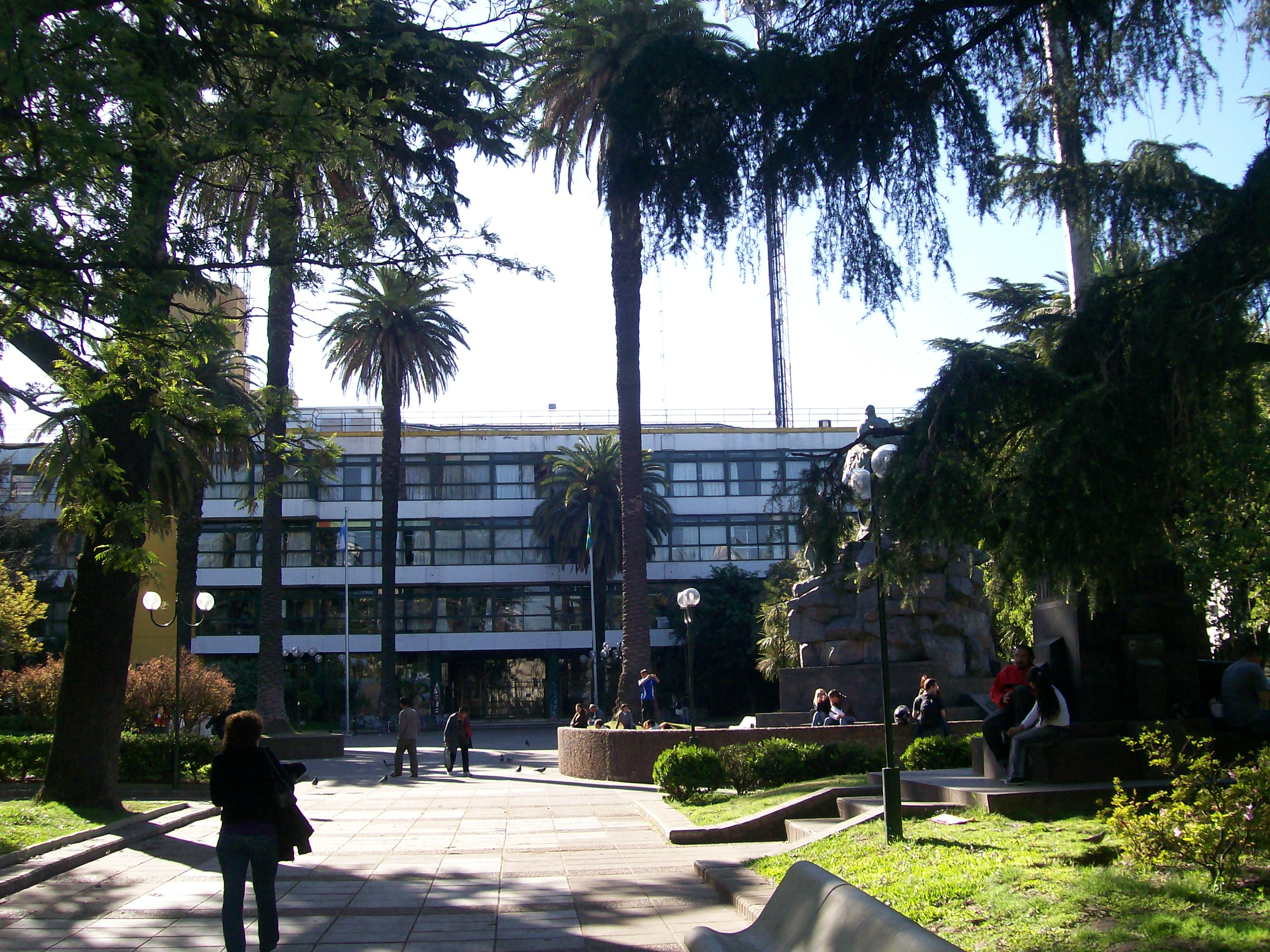 Plaza de San Martín, Municipalidad. San martín, prov de Buenos Aires.